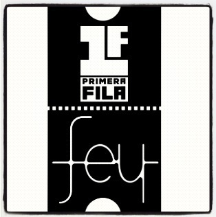 Logo del album de Fey 2012